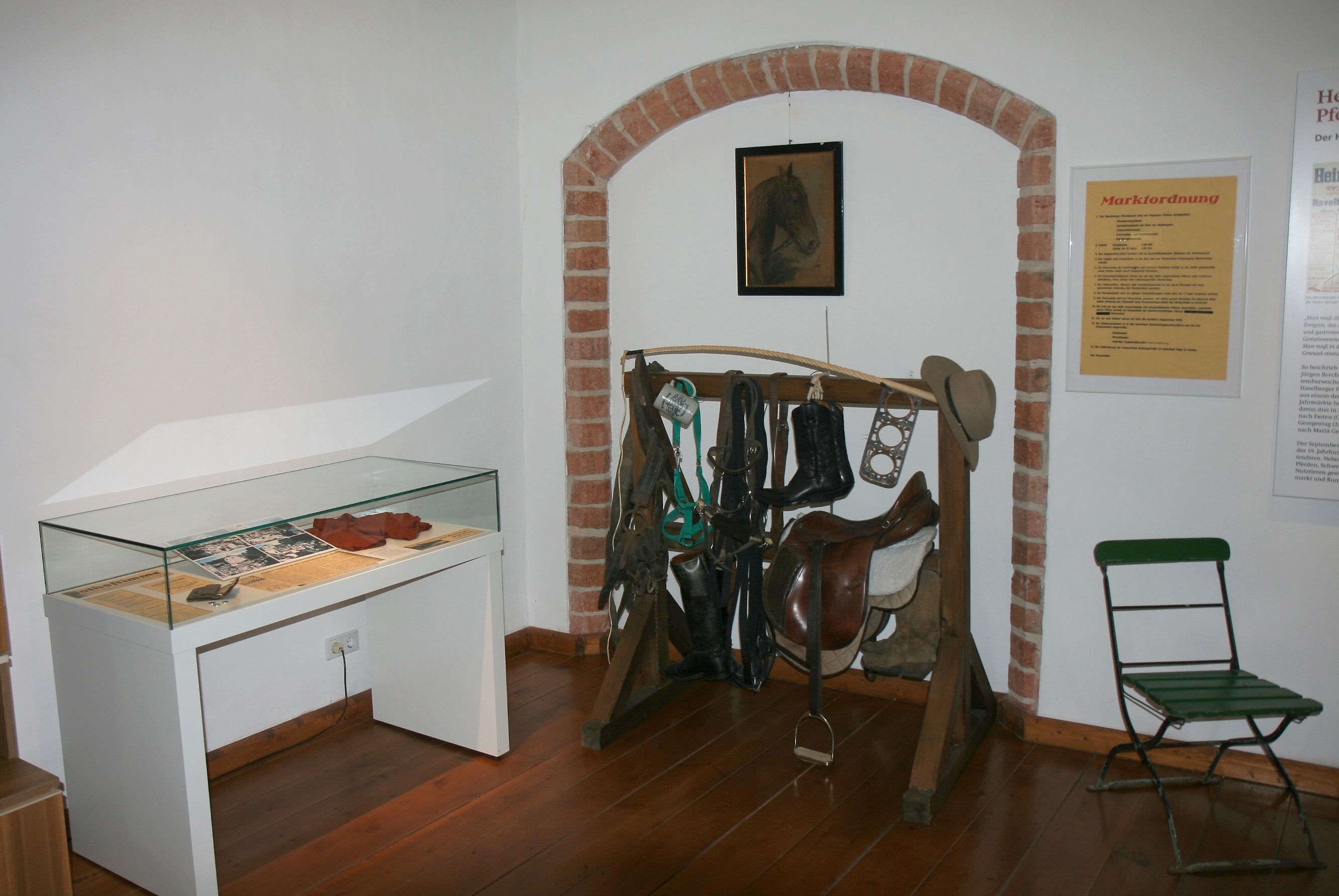 Pferdemarkt-Exponate im Prignitz-Museum in Havelberg, Domplatz 3.